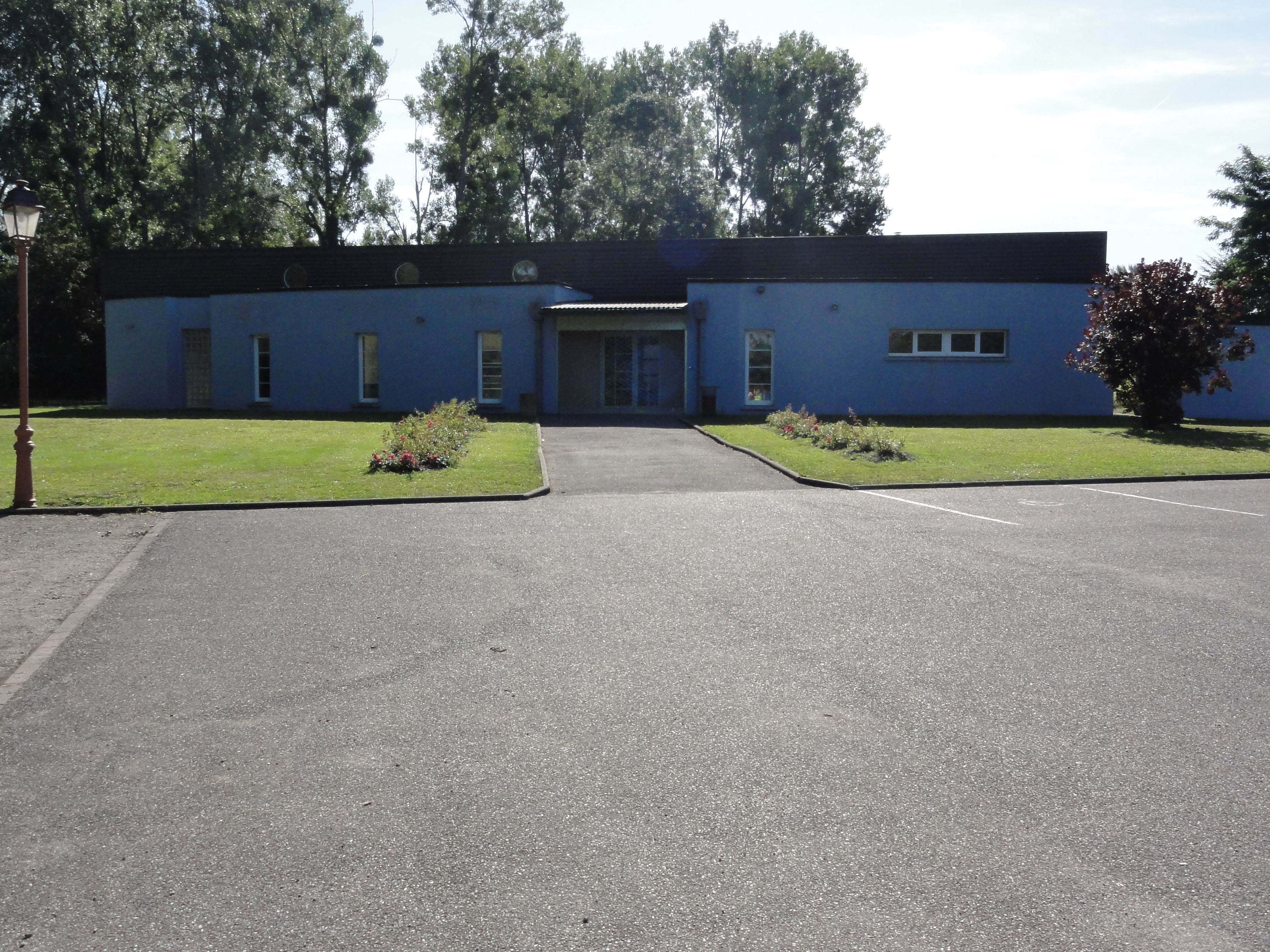 Sommelonne (Meuse) salle des fêtes